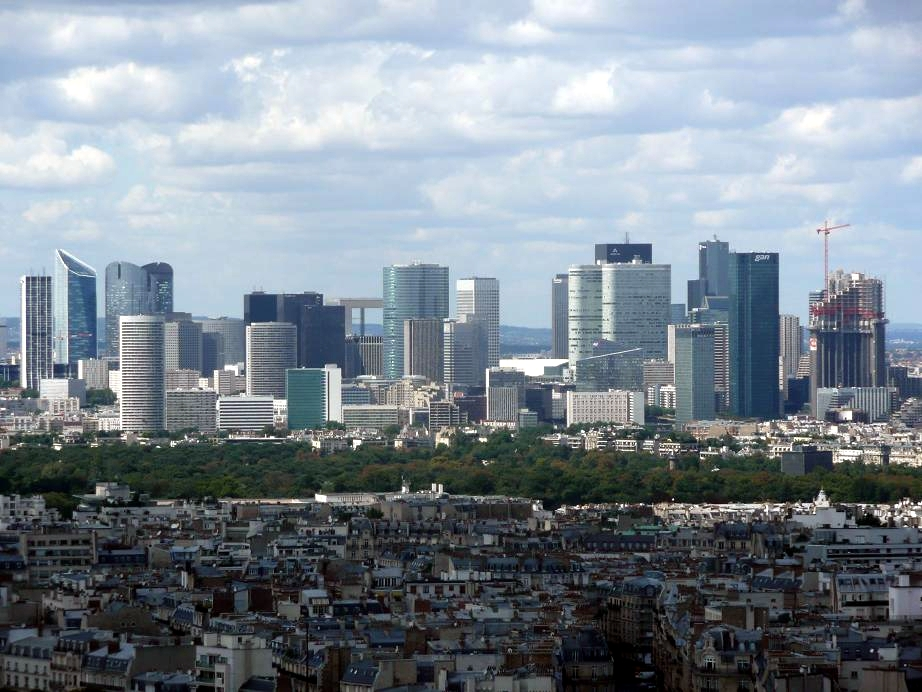 quartier d'affaires de La Défense vu depuis le deuxième étage de la tour Eiffel, à Paris, France.